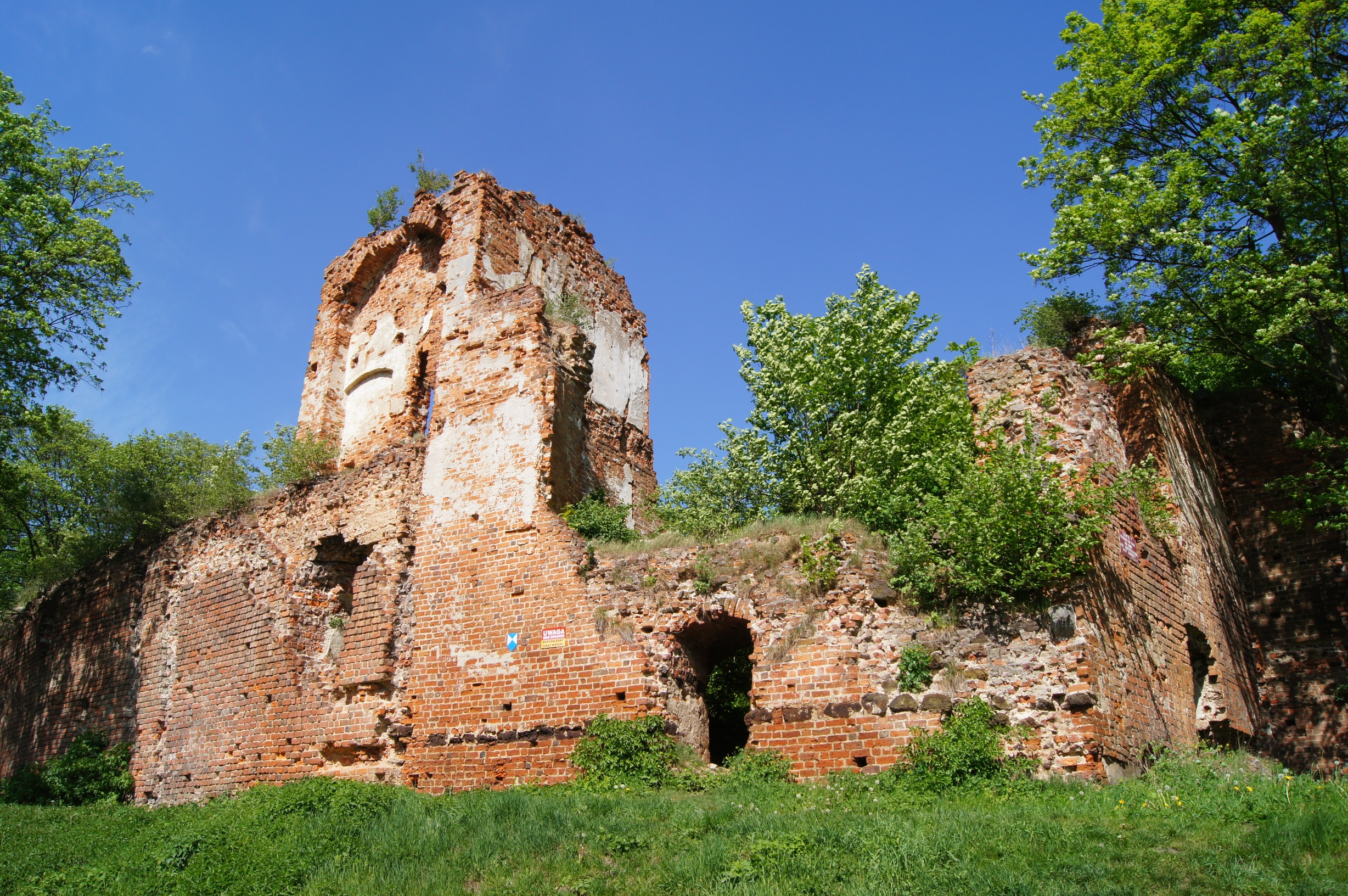 Ruiny zamku - Milicz